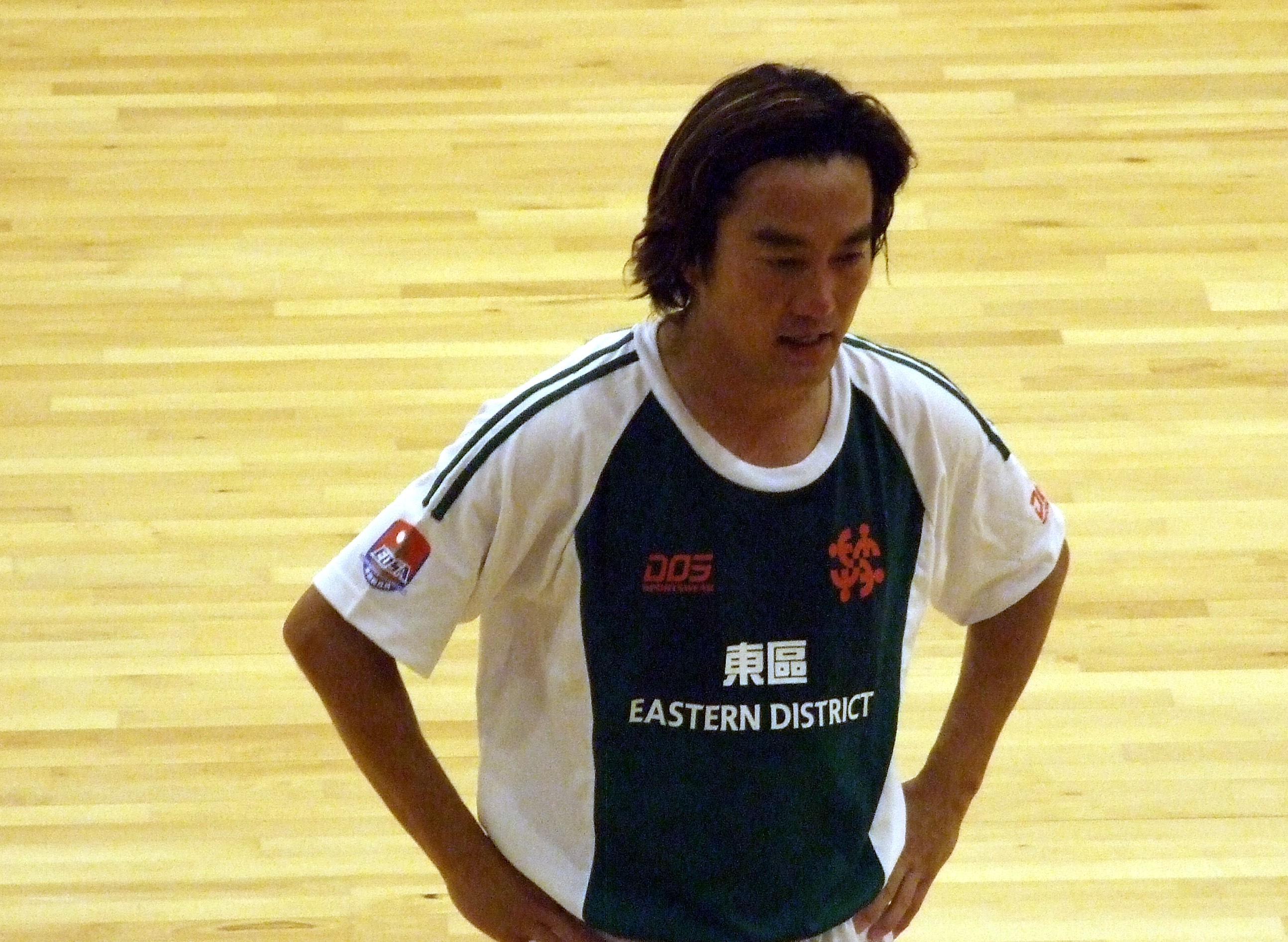 中文（香港）: 譚兆偉參加2011年全港運動會五人足球決賽